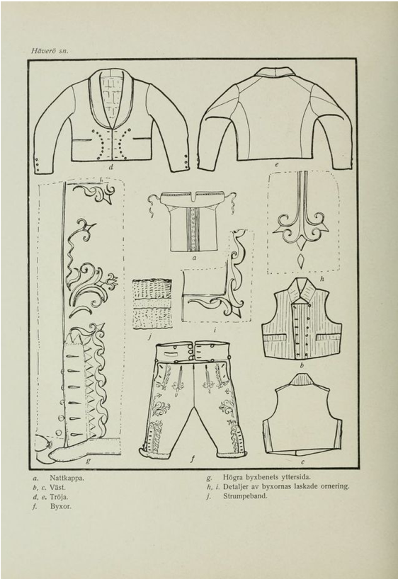 Skiss av ingående plagg i häverö mansdräkt.